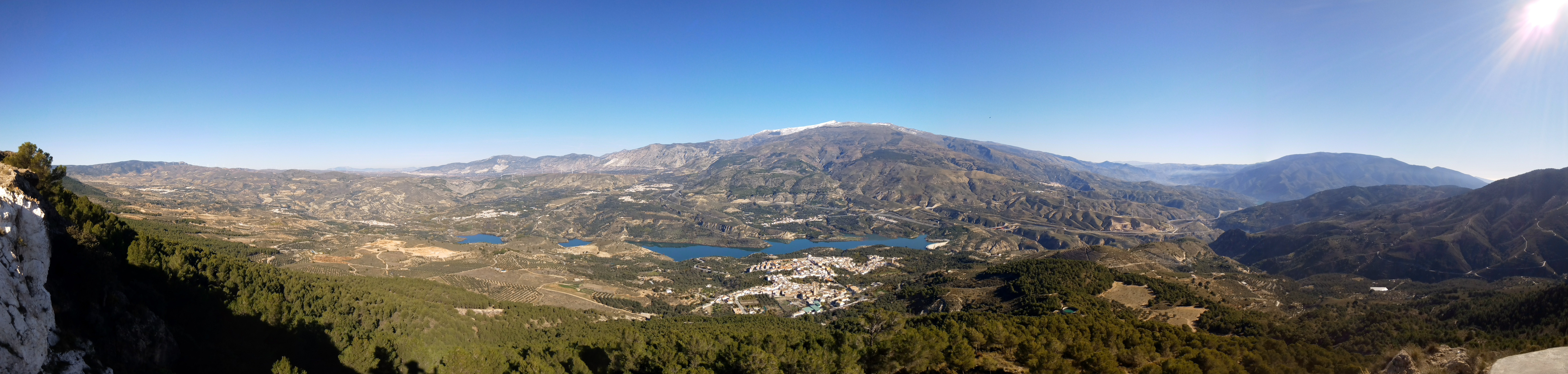 Panorámica de la parte meridional del Valle de Lecrín desde la ermita del Santo Cristo del Zapato, sobre el cerro Chinchirina, con la localidad de Pinos del Valle al frente.